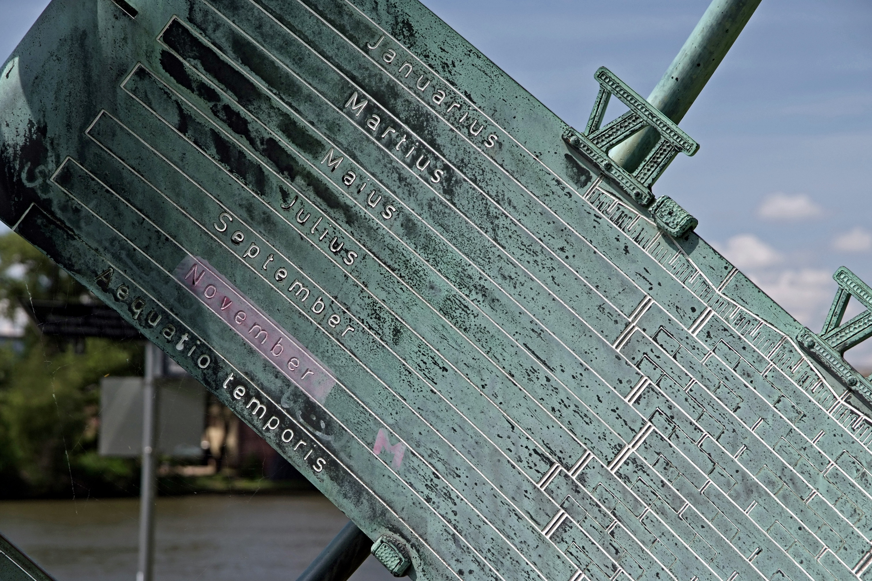 Äquatorialsonnenuhr in Frankfurt am MainHauptskala: morgendlicher Anfang